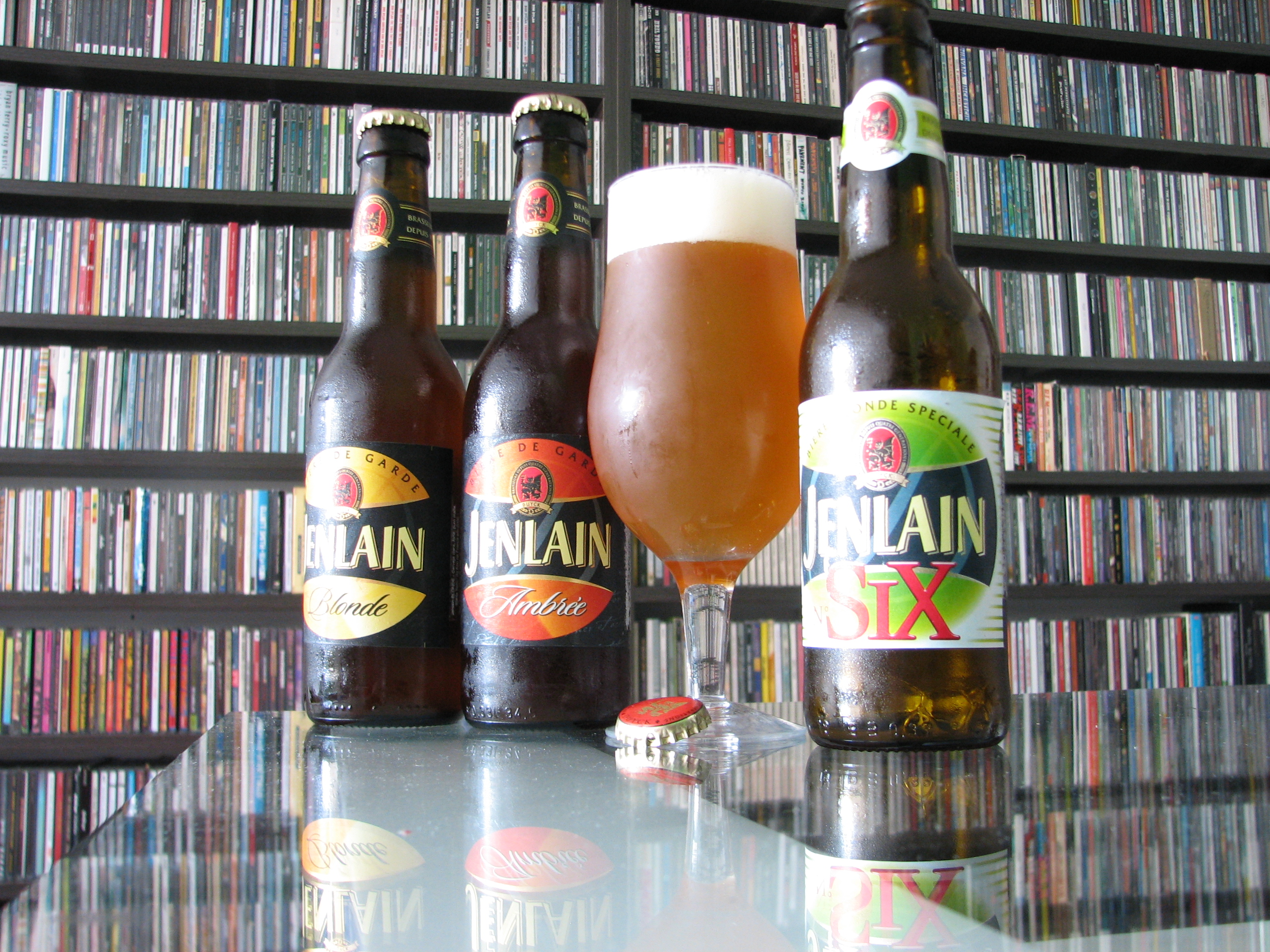 Bières de la marque Jenlain